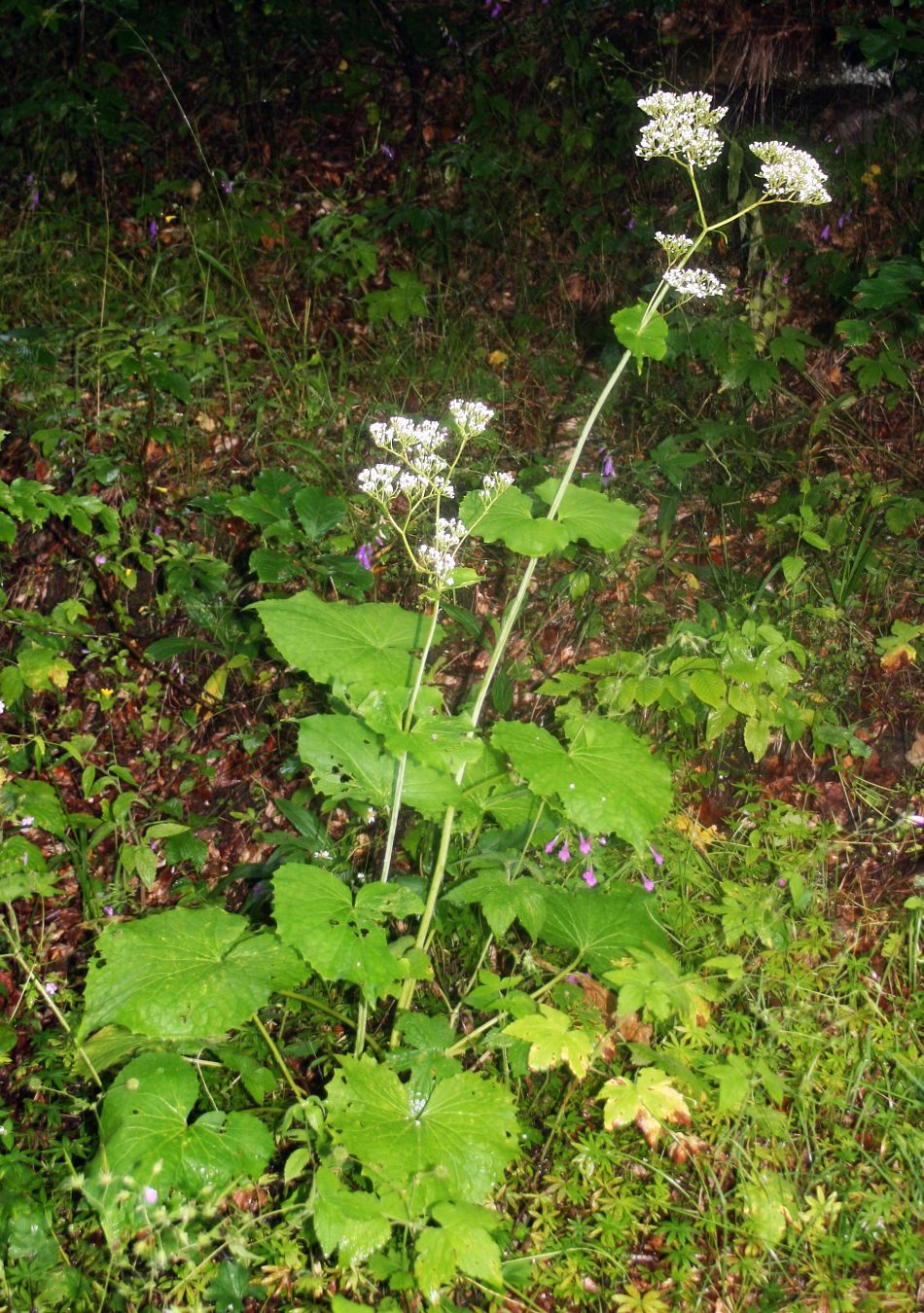 Valeriana alliariifolia, Baldriangewächse (Valerianaceae) – Georgien/საქართველო: Kleiner Kaukasus, S Bakuriani/ბაკურიანი, ca. 1785 m s.m.